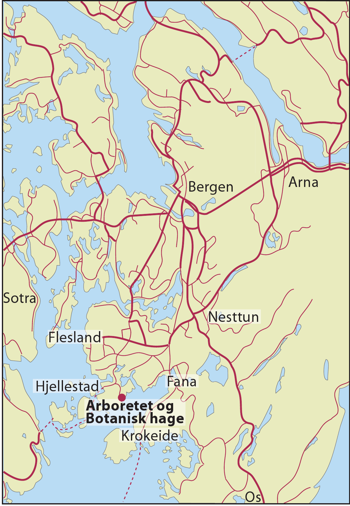 Hvor Arboretet og Botanisk hage og Det norske arboret befinner seg i forhold til Bergen.